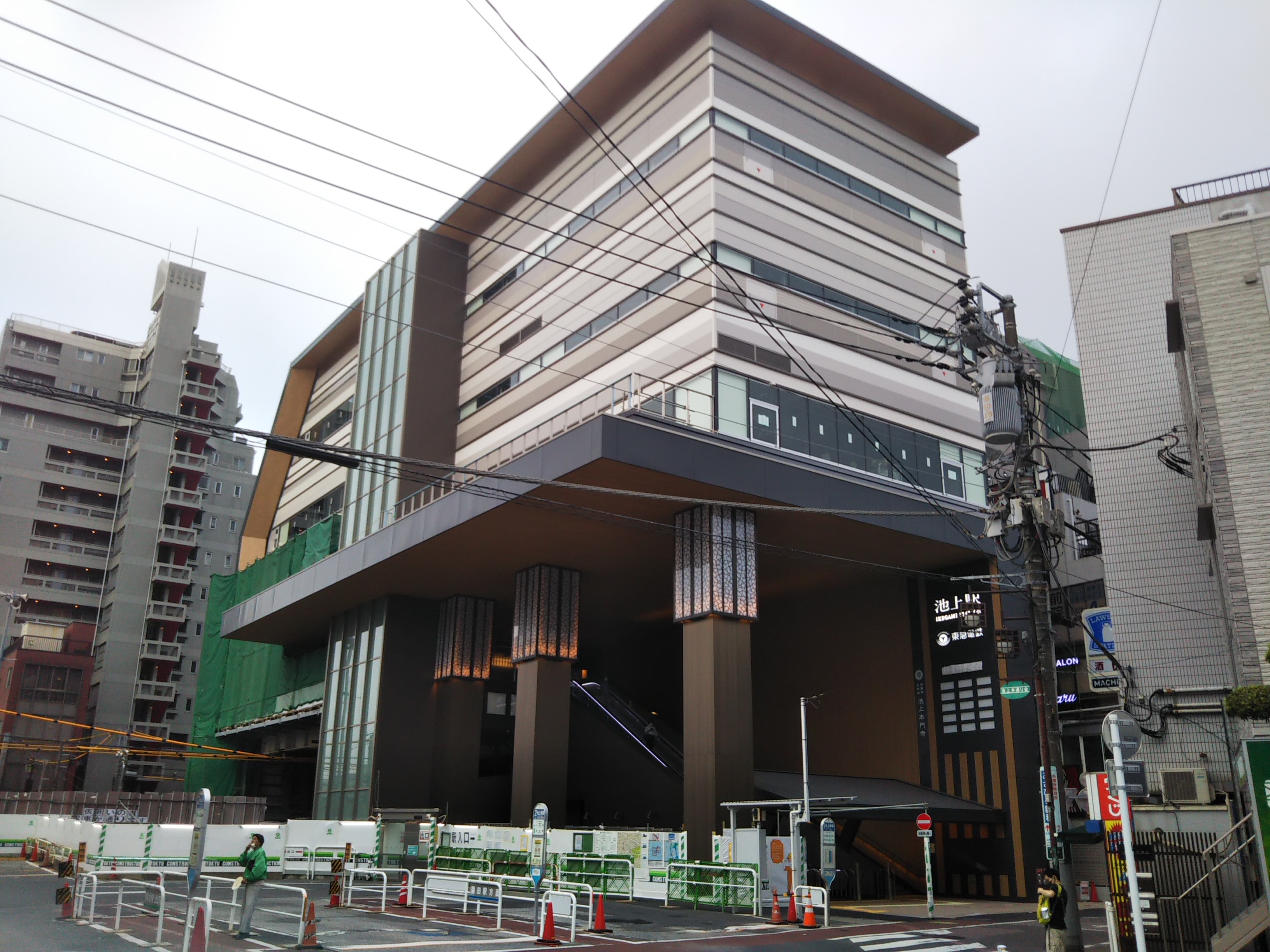 池上駅北口。